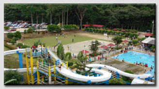 Complejo Eco-tutístico El Paraíso, Moromoro. Piñas. Unknown